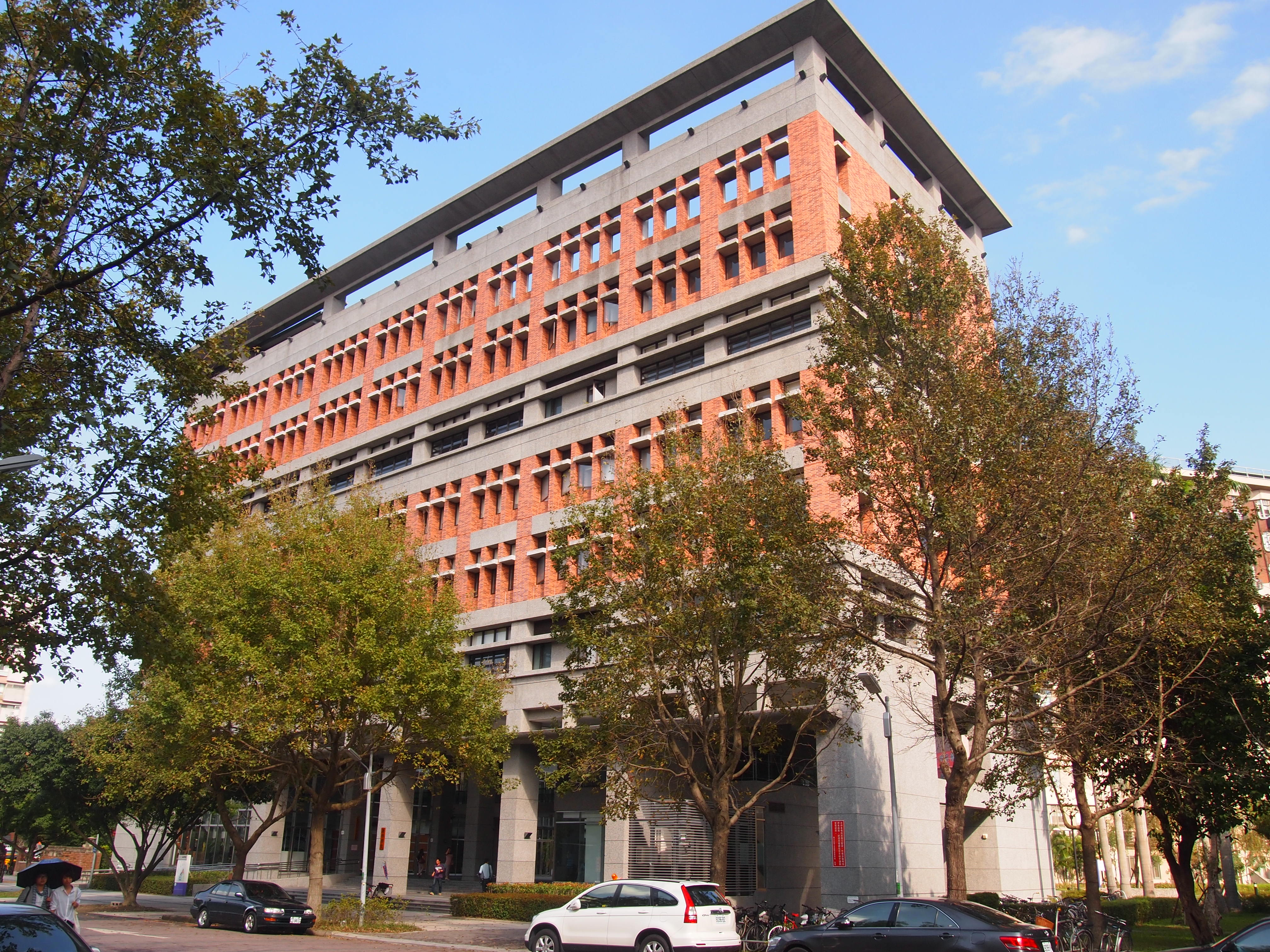 國立臺灣大學霖澤館正面。